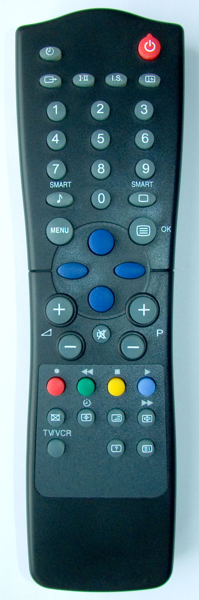 Infrared remote control.